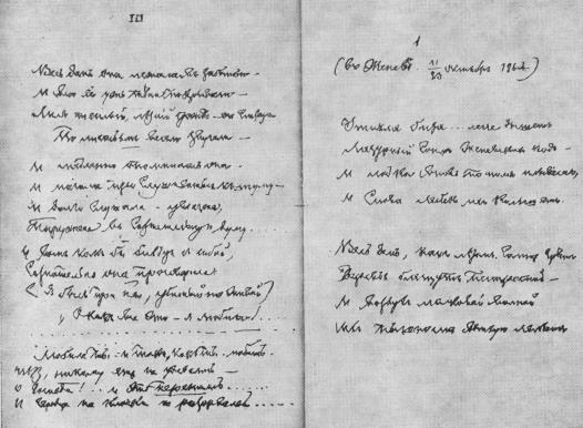 Tyutchev All day she lay unconscious. autographs 1864